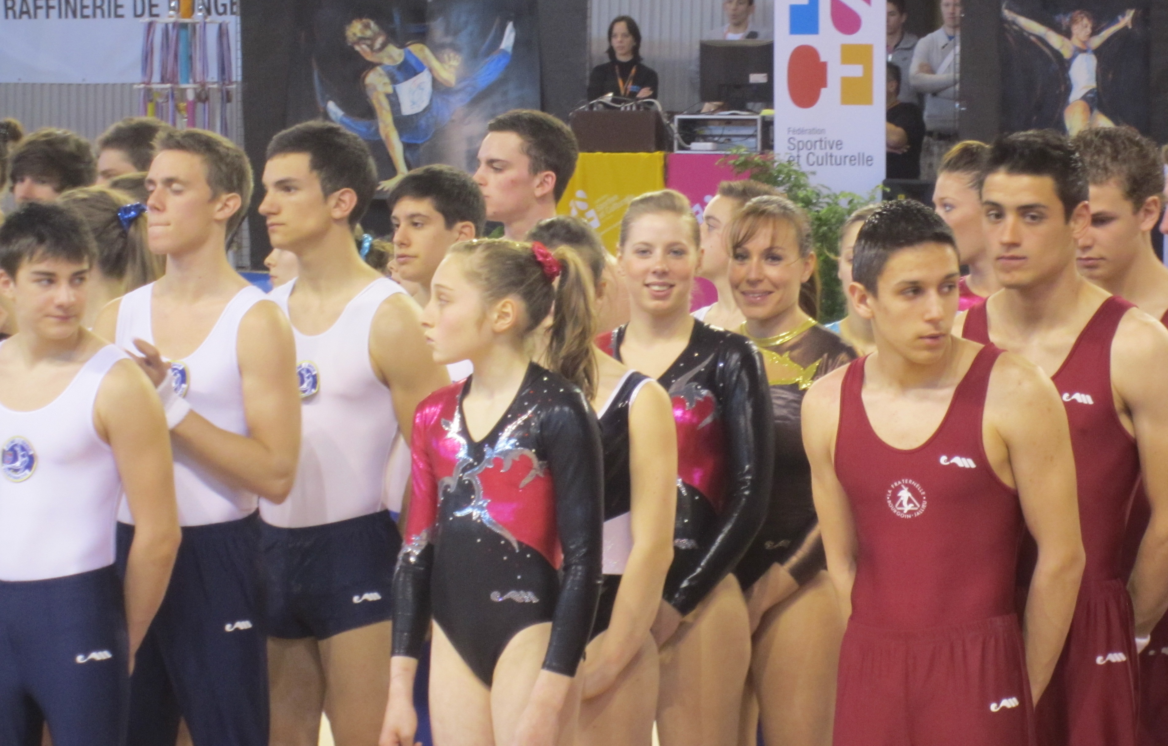 Gymnastes attendant la lecture du palmarès, finale des Coupes de France FSCF.